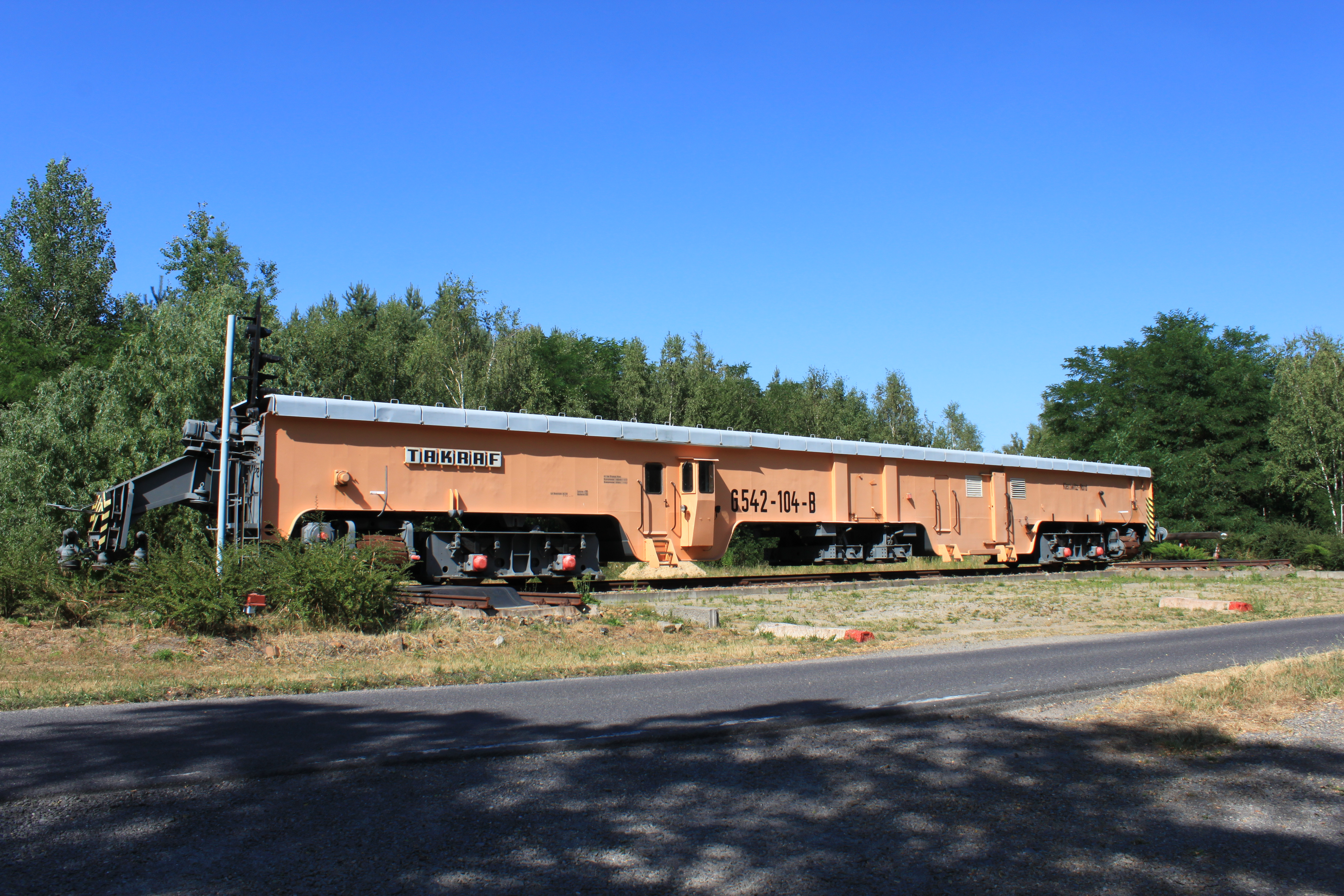 Der Dieselgleisrücker hatte die Aufgabe, Gleise der Tagebaue im Abraum und auf der Kohlesohle zu verrücken.